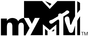 Logo de myMTV depuis le 17 novembre 2015.